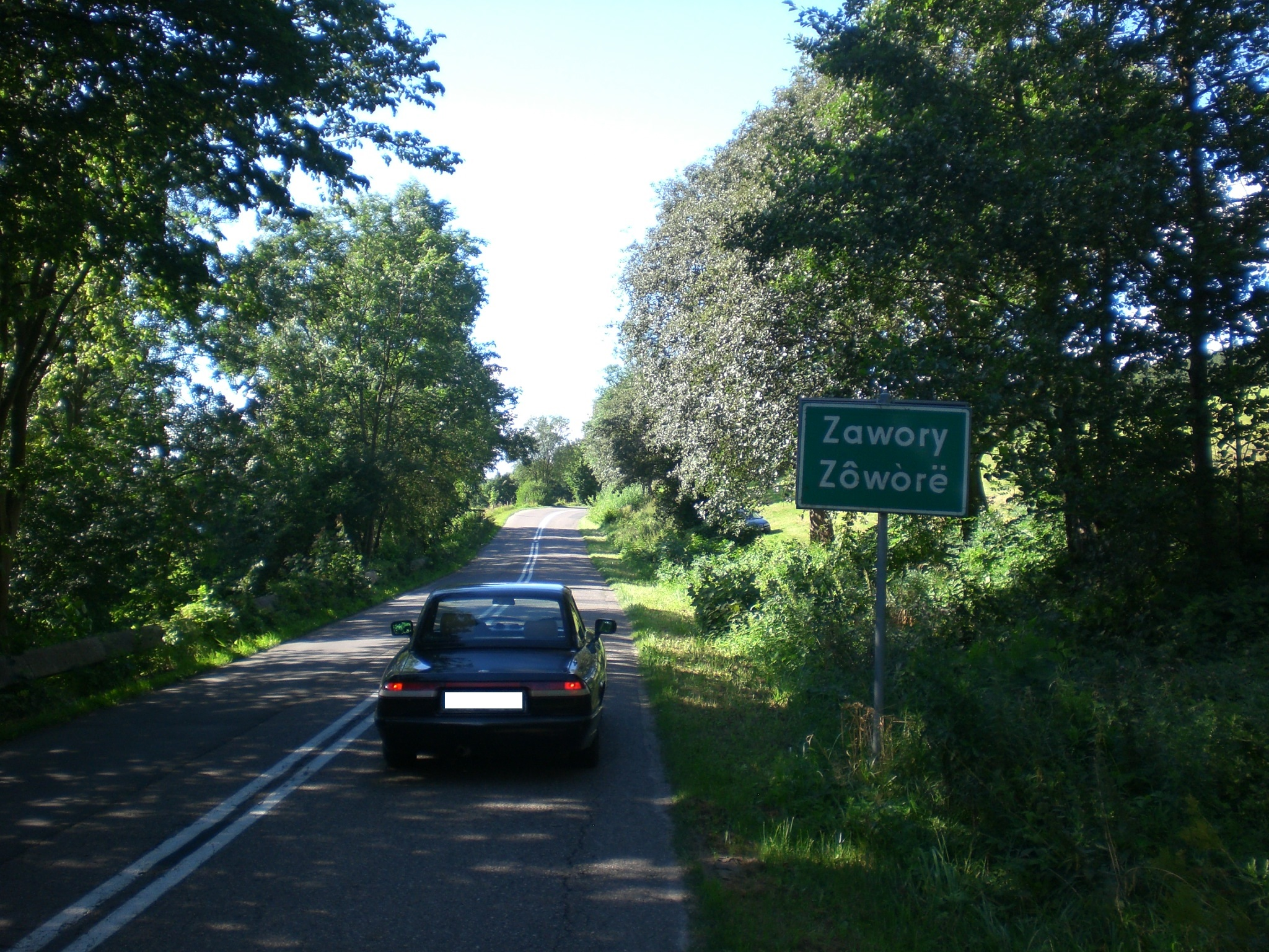 Zawory